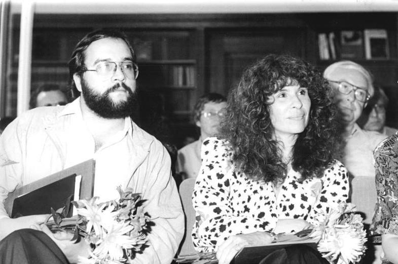 Berlin, Verleihung eines Literatur-Stipendiums ADN-ZB Uhlemann 19.5.89 Berlin: Seghers-Stipendium - Das Anna-Seghers-Stipendium der Akademie der Künste wurde der nikaraguanischen Autorin Gioconda Belli (r.) und Ramon Diaz Eterovic (l.) aus Chile überreicht. Siehe ADN-Meldung vom 19.5.1989